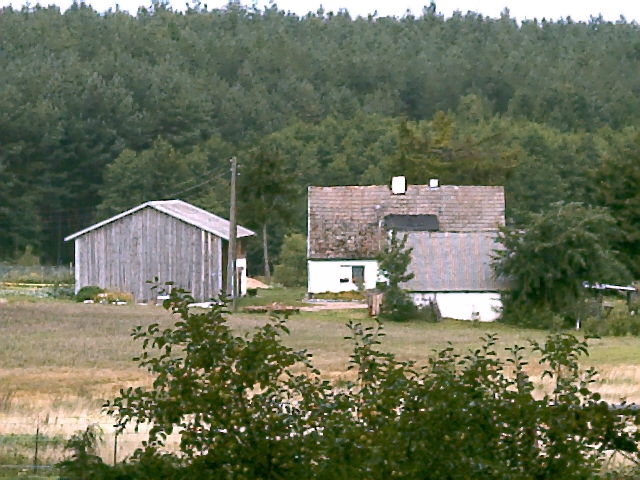 Łękwica